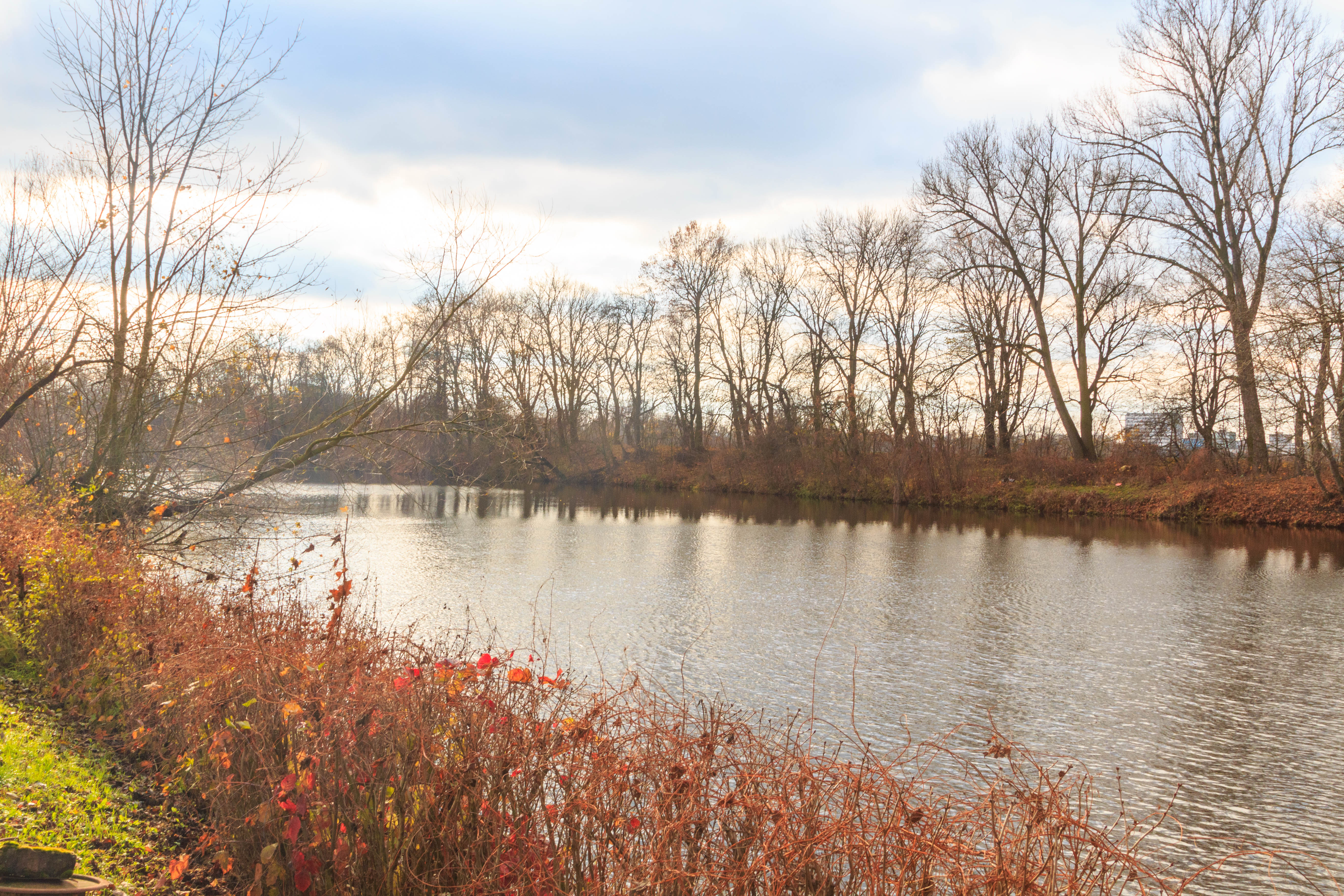 Malý Slepák Project: Vodstvo.